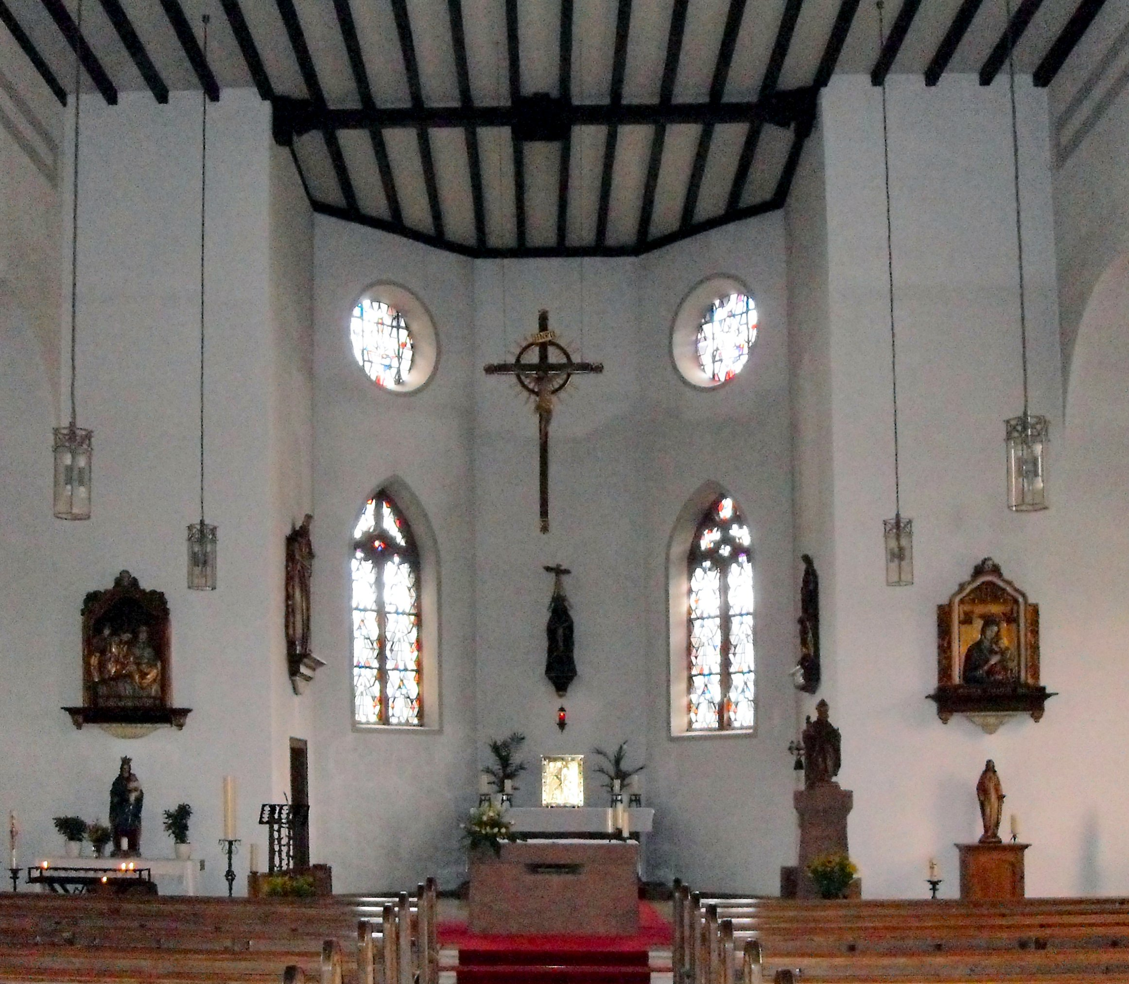 Innenansicht der Pfarrkirche St. Brictius in Olzheim, Eifelkreis Bitburg-Prüm